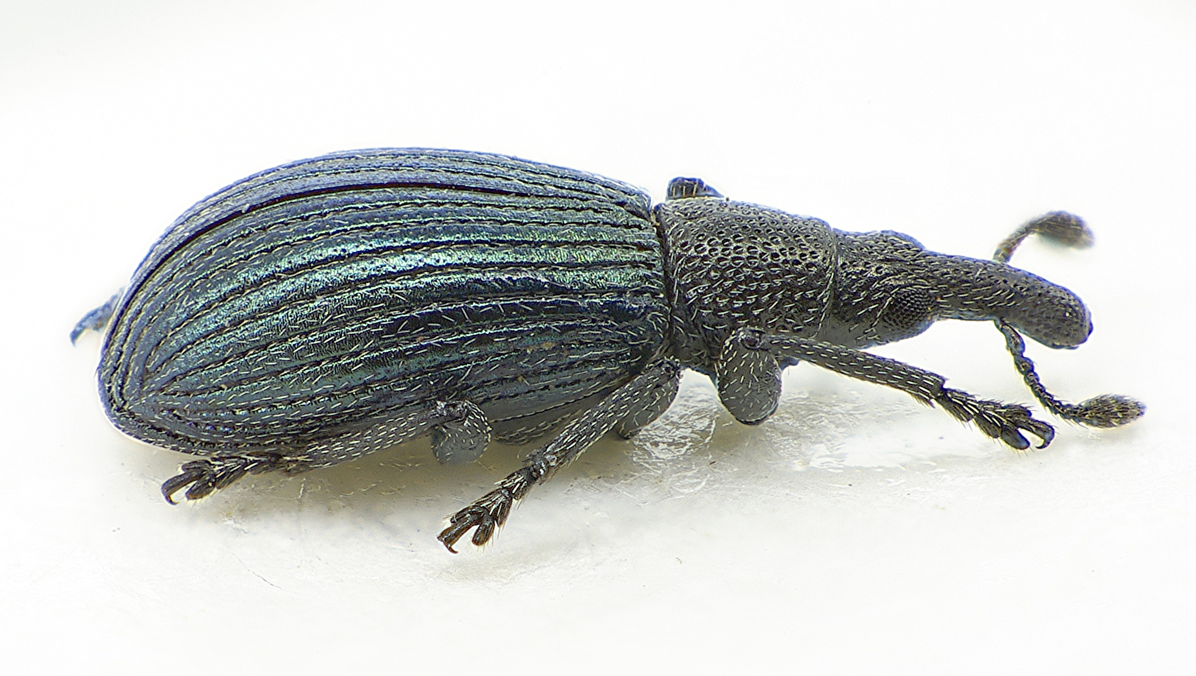 Perapion violaceum aus Frankreich bei Muhlouse am15. April 2013 Seitenansicht